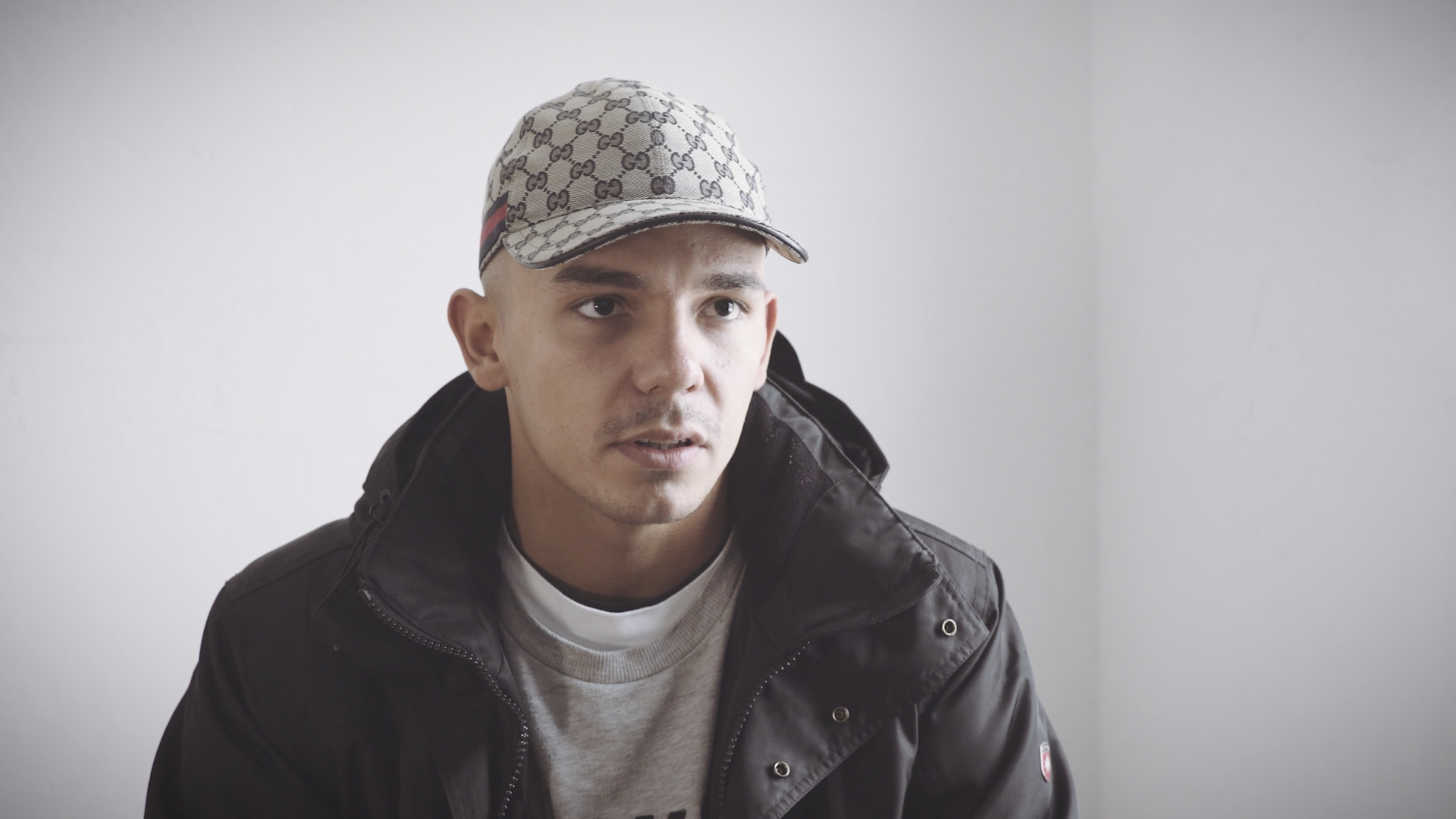 Der Rapper Capital Bra trägt Lederjacke und Kappe. Er schaut in die Kamera